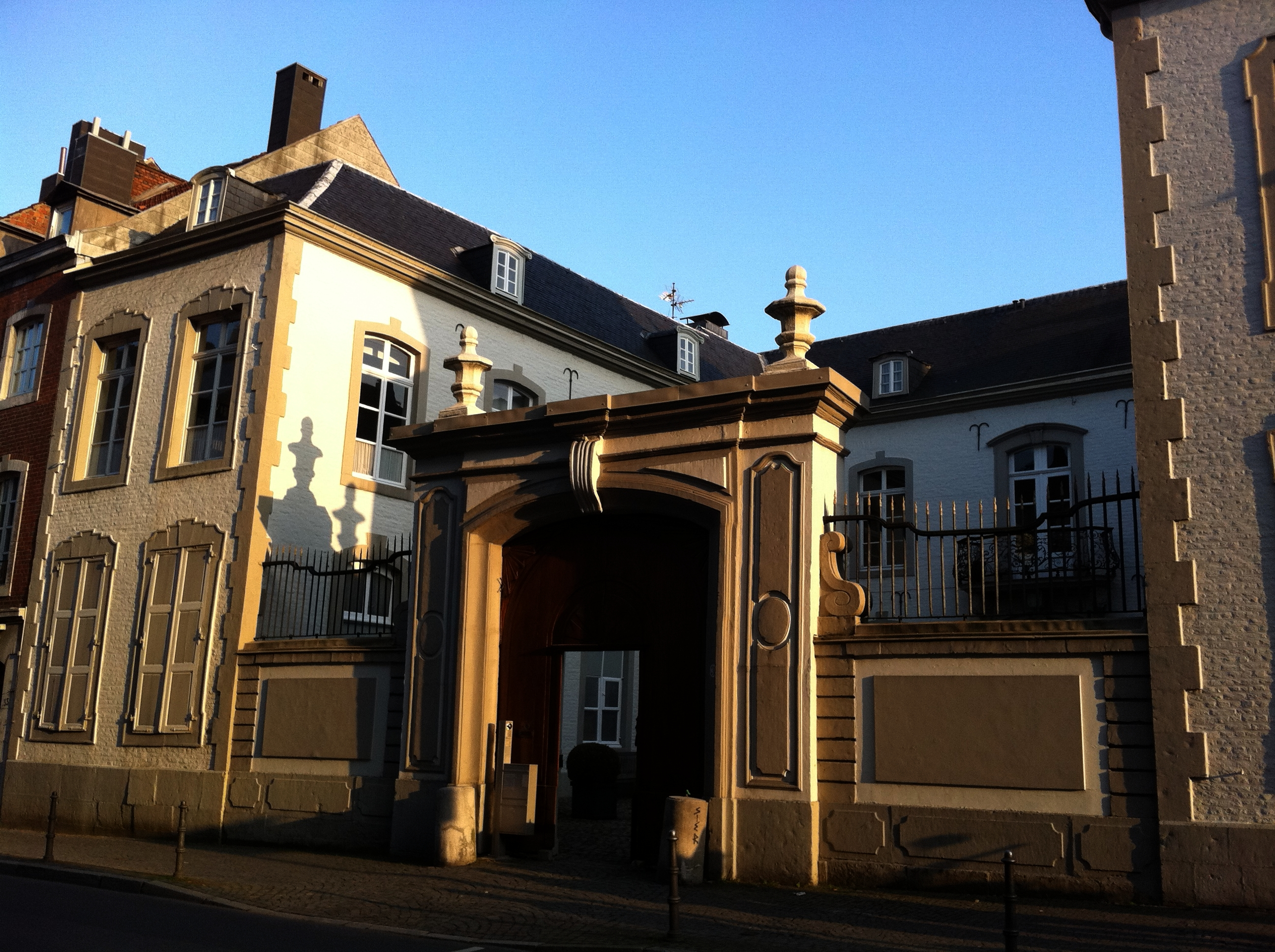 Das Wylre'sche Haus in der Jakobstraße (Aachen), eine dreiflügelige Hofananlage